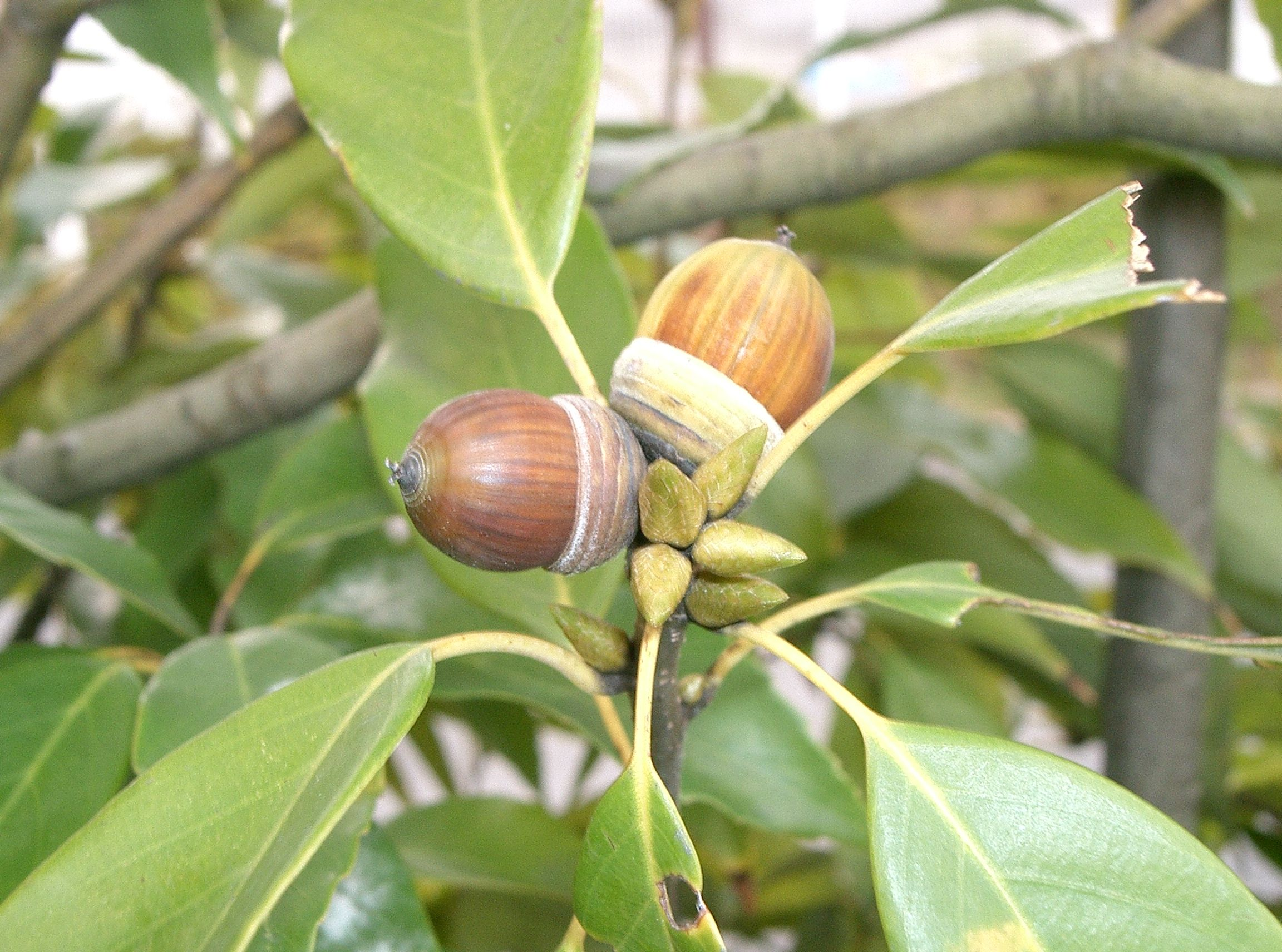 Scientific name Quercus glauca